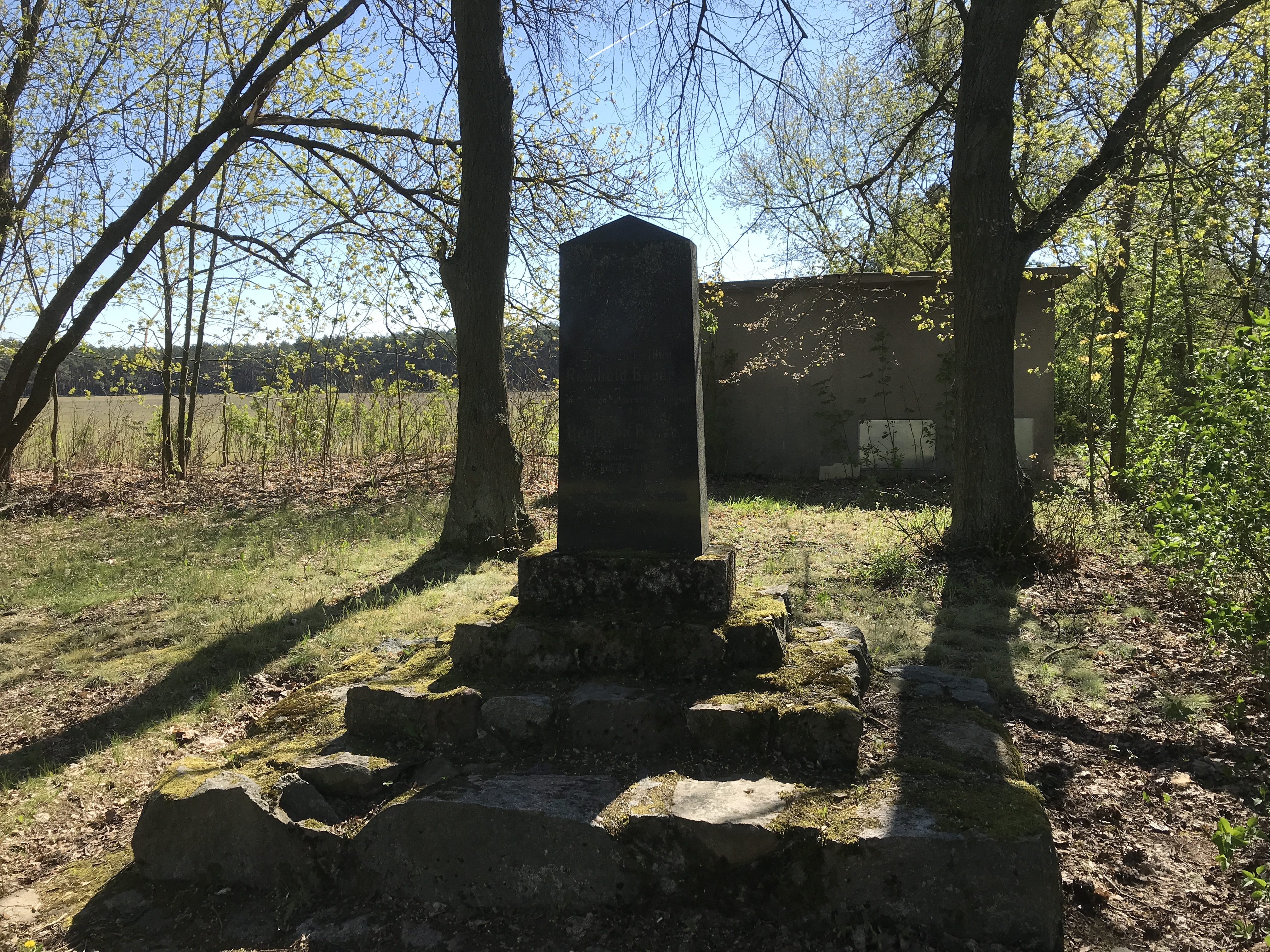 Kirchhofen, ein Gemeindeteil von Spreenhagen im Landkreis Oder-Spree in Brandenburg